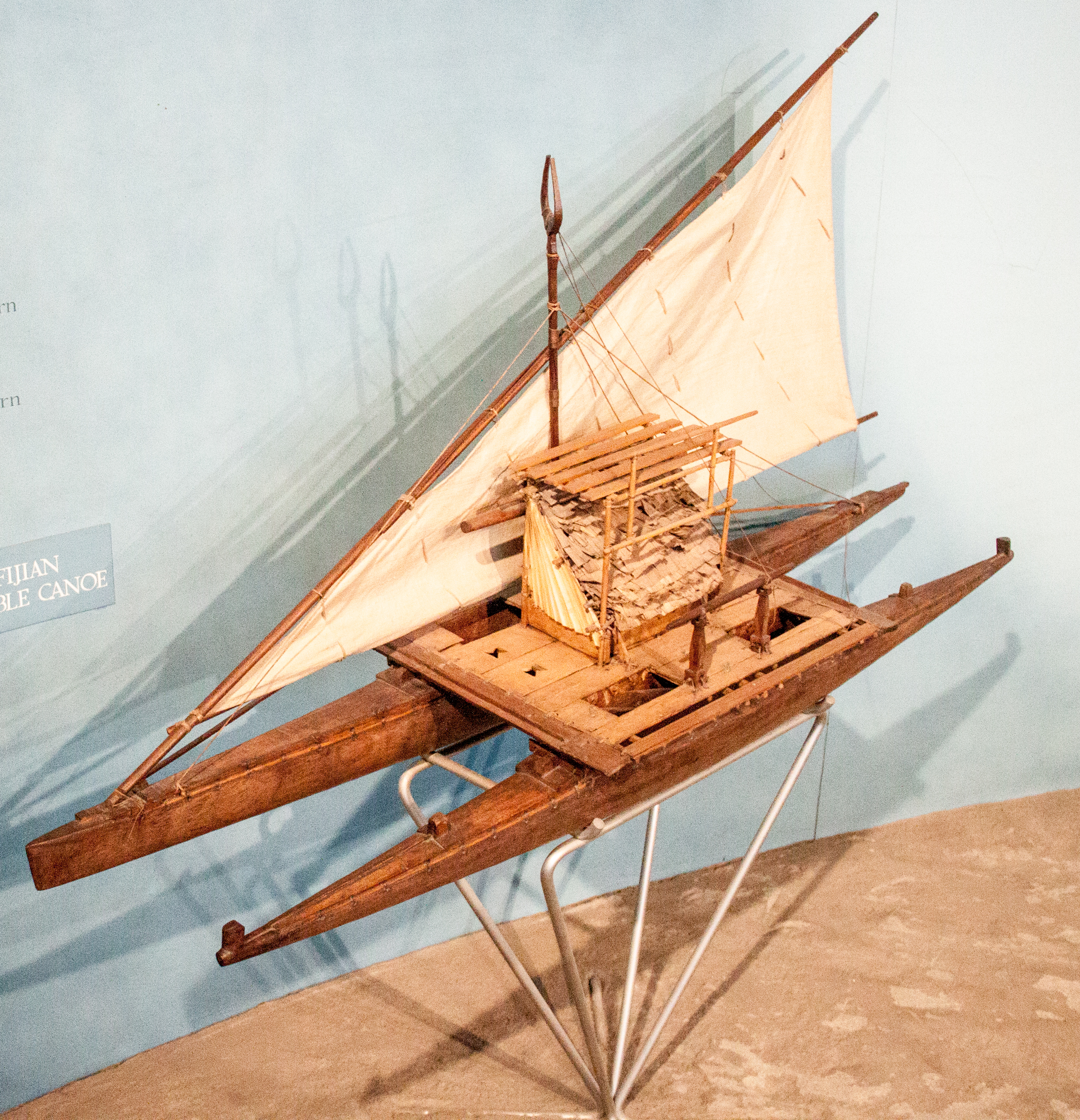 Fiji double canoe, model